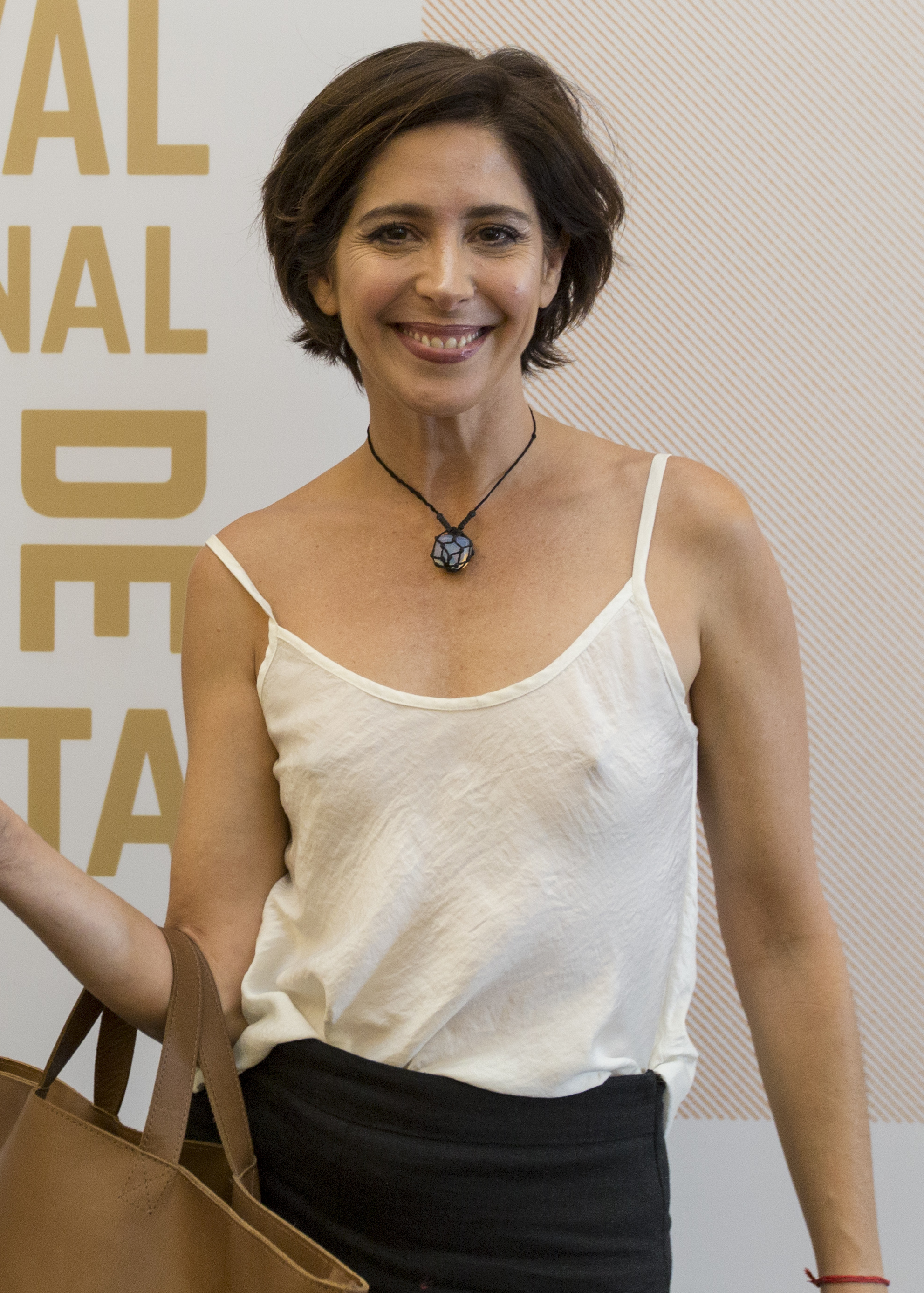 Mar del Plata, 17 de Noviembre de 2017.- Inauguró el 32º Festival Internacional de Cine. Foto: Soledad Amarilla / Ministerio de Cultura de la Nación Argentina.